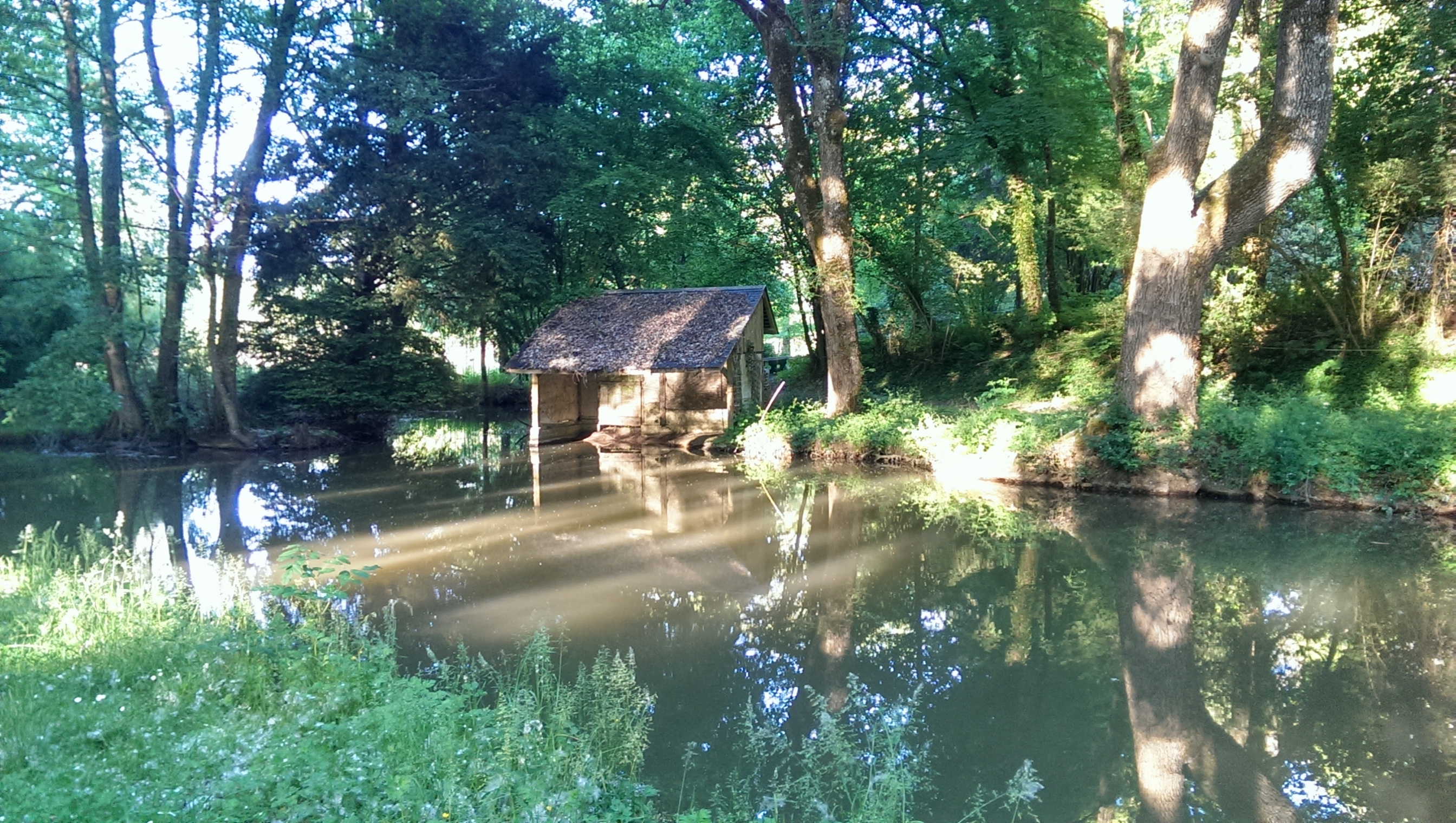 Un ancien lavoir, sur la Cisse, à Chambon-sur-Cisse.